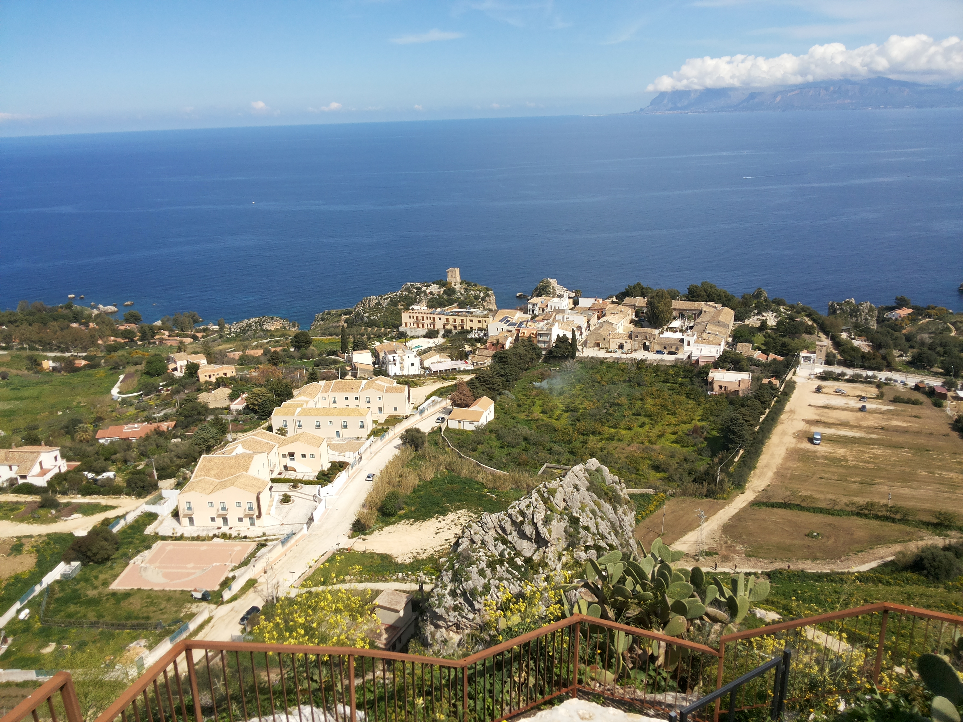 Panorama di Scopello visto da Torre Bennistra